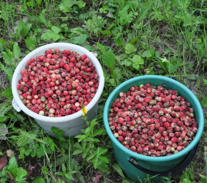 Strawberries gathered in Buryatia, Russia. Fragaria viridis - клубника